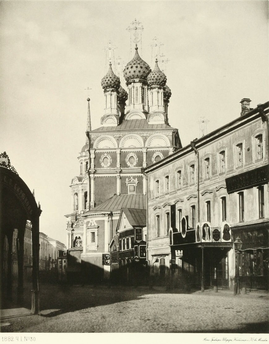 Церковь Николы Большой Крест (1680) на Ильинке